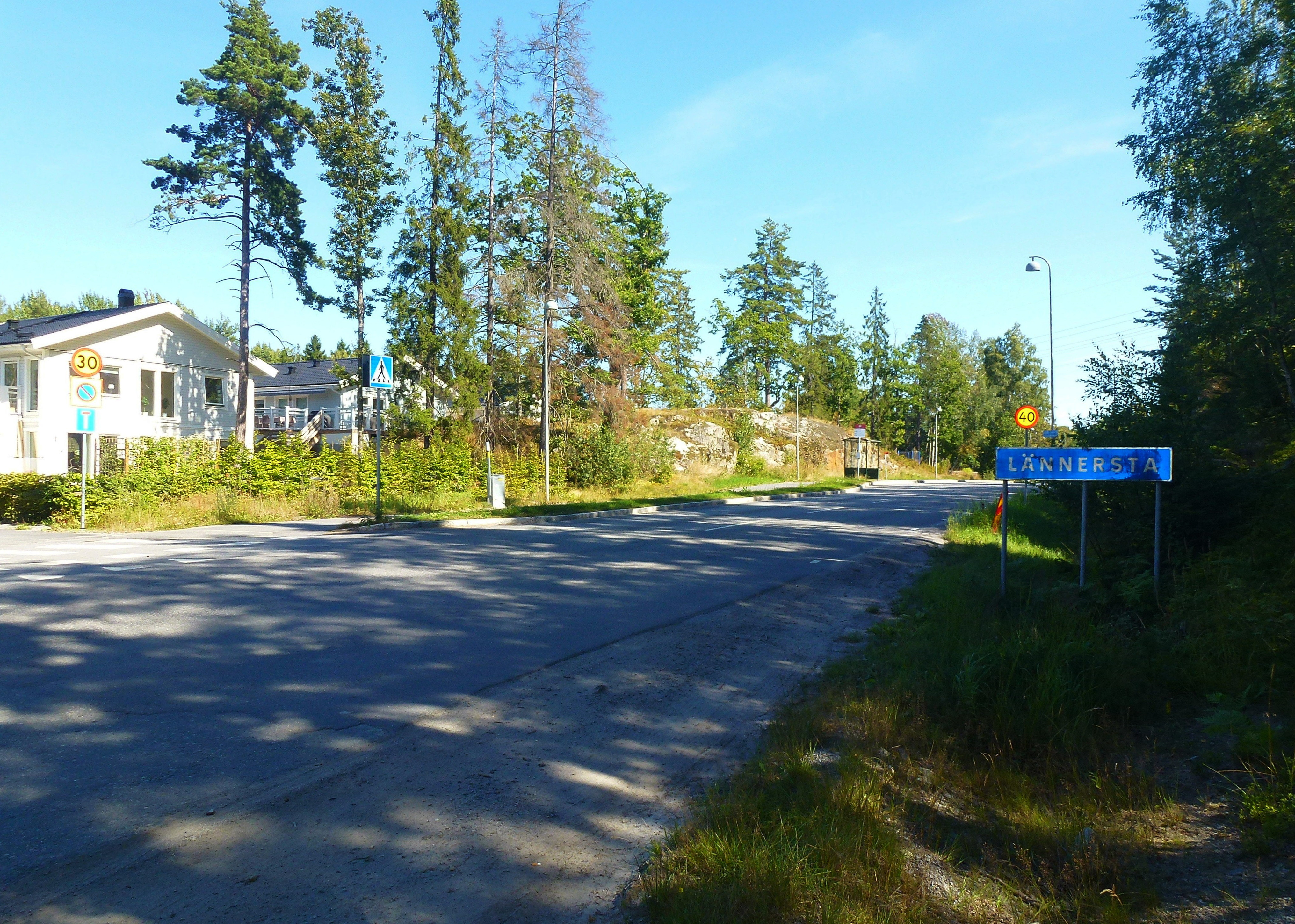 Lännersta, ortsskylt